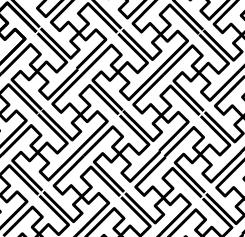 万字纹 自己绘制